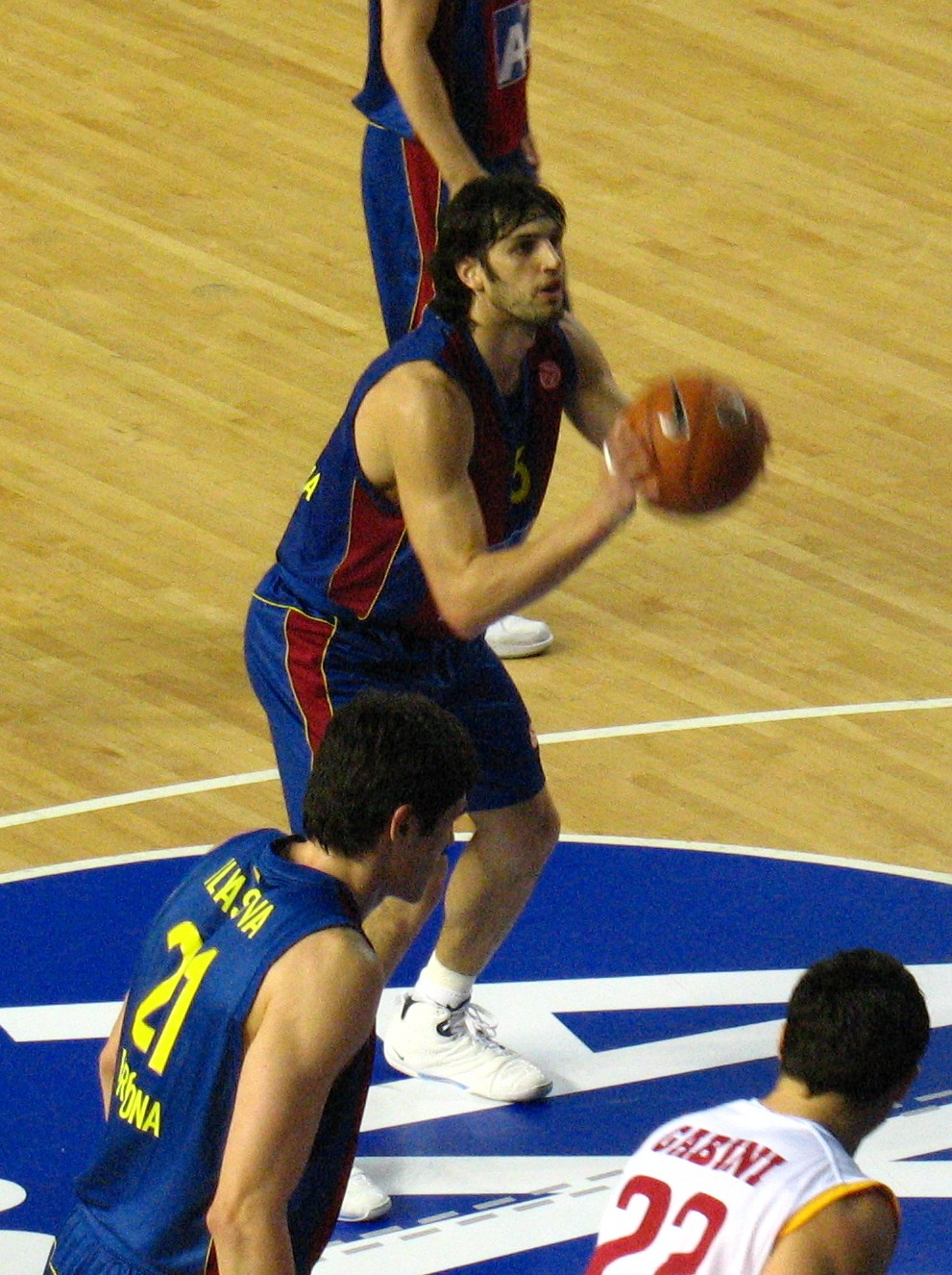 Gianluca Basile en acción con la camiseta del Barcelona